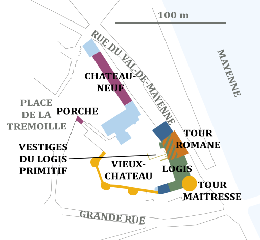 Plan du Château de Laval, montrant ses différents éléments et leur époque de construction.